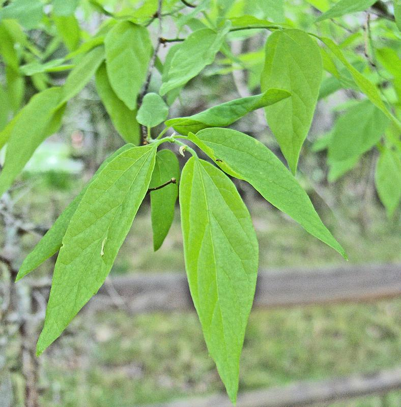 Sugarberry